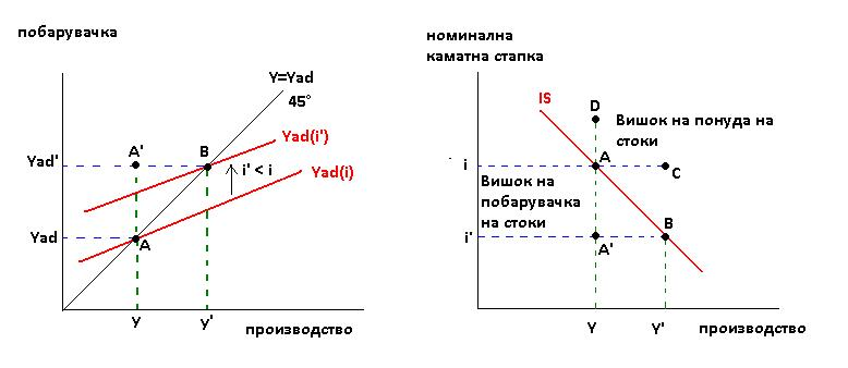 Изведување на IS кривата на пазарот на стоки, од кејнзијанскиот вкрстен дијаграм